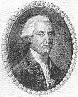 Portrait d'époque de Louis La Corne